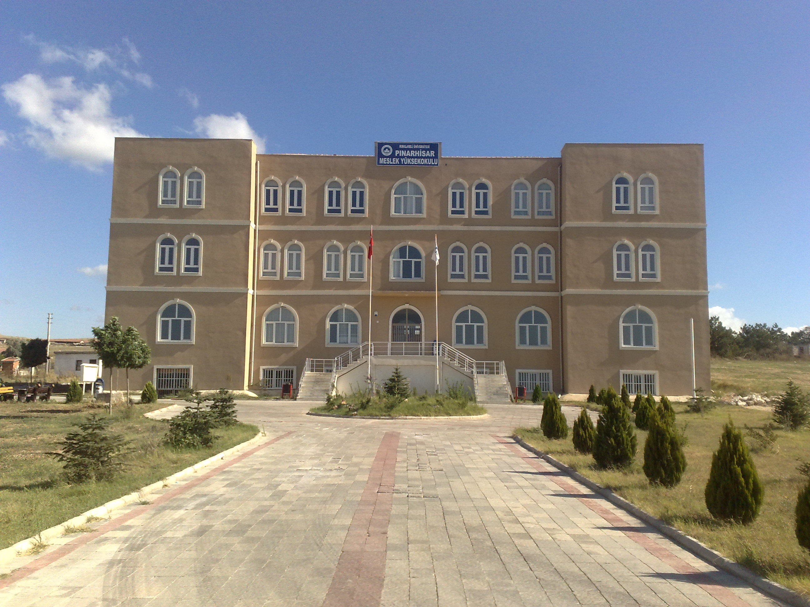 Kırklareli Üniversitesi Pınarhisar Meslek Yüksek Okulu